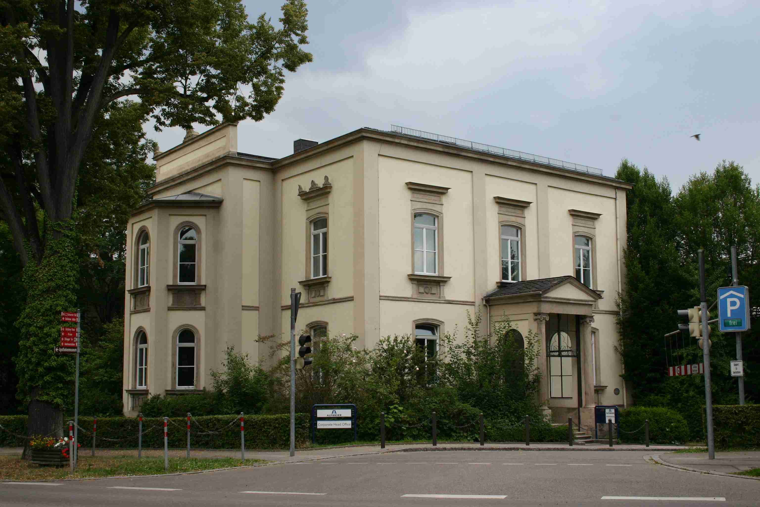 Dörflervilla Weißenburg